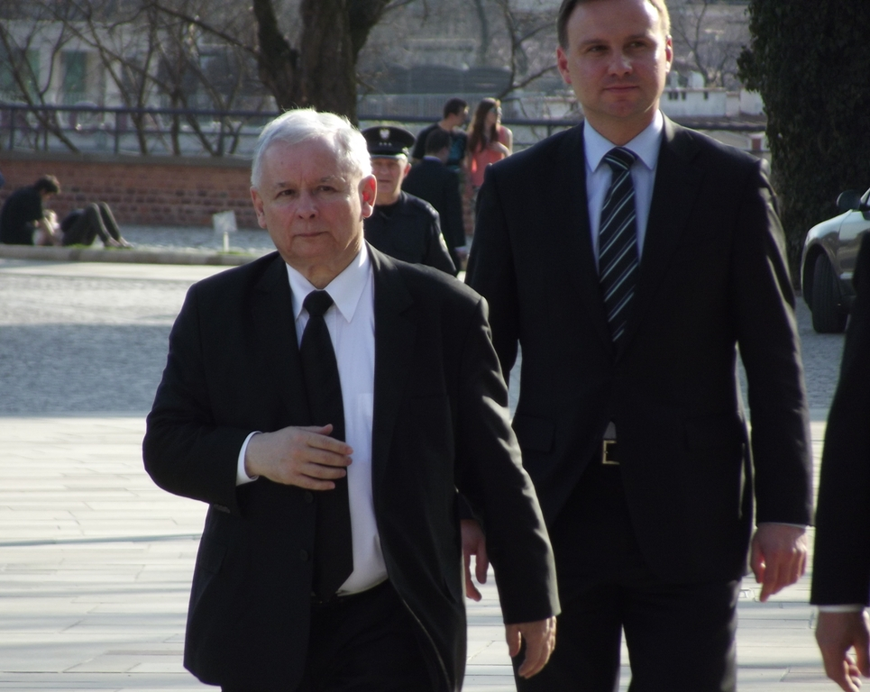 Zdjęcie zrobione podczas trzeciej rocznicy pogrzebu Lecha i Marii Kaczyńskich w Krakowie.